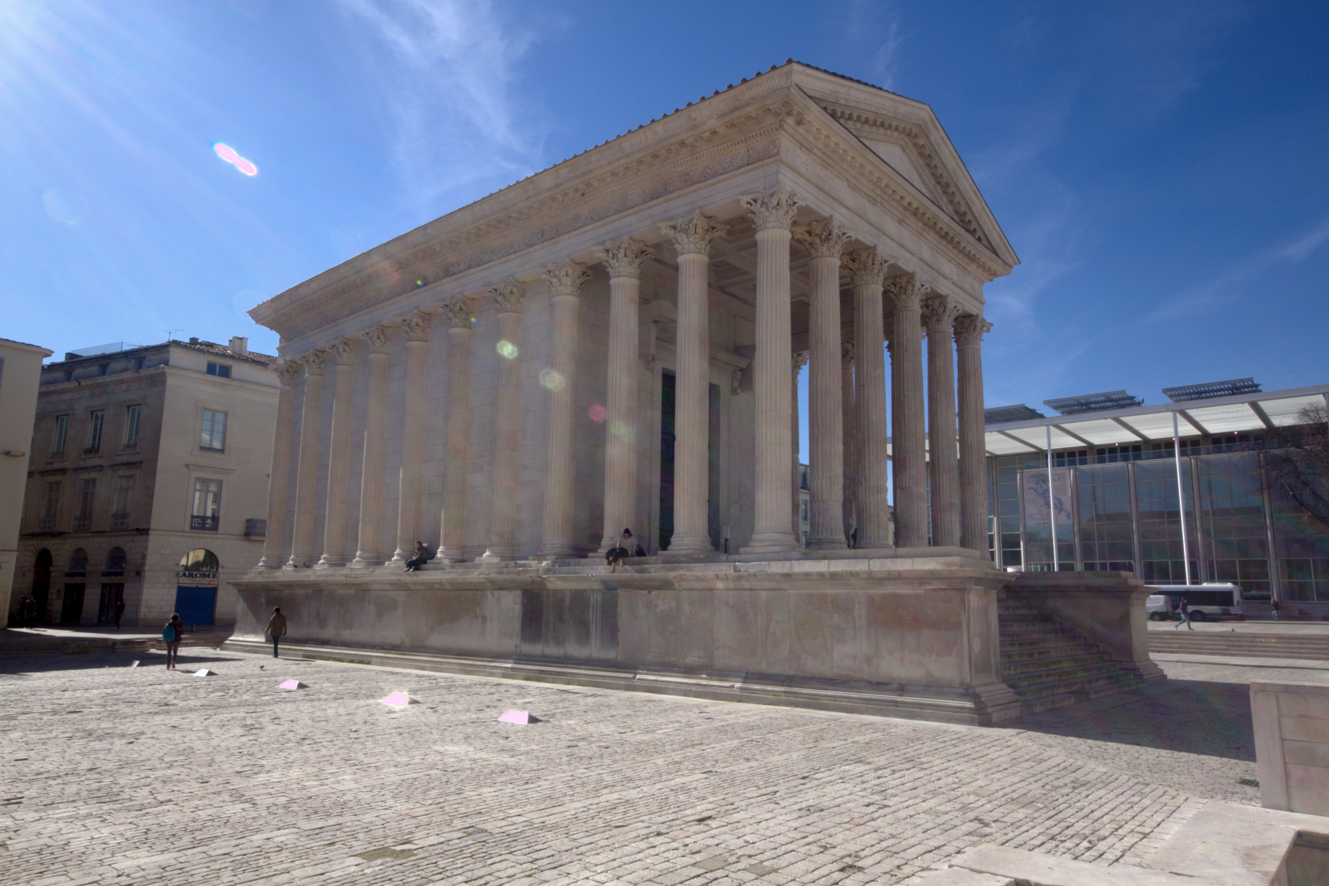 Maison CarrèeСаха тыла: Maison Carrèe